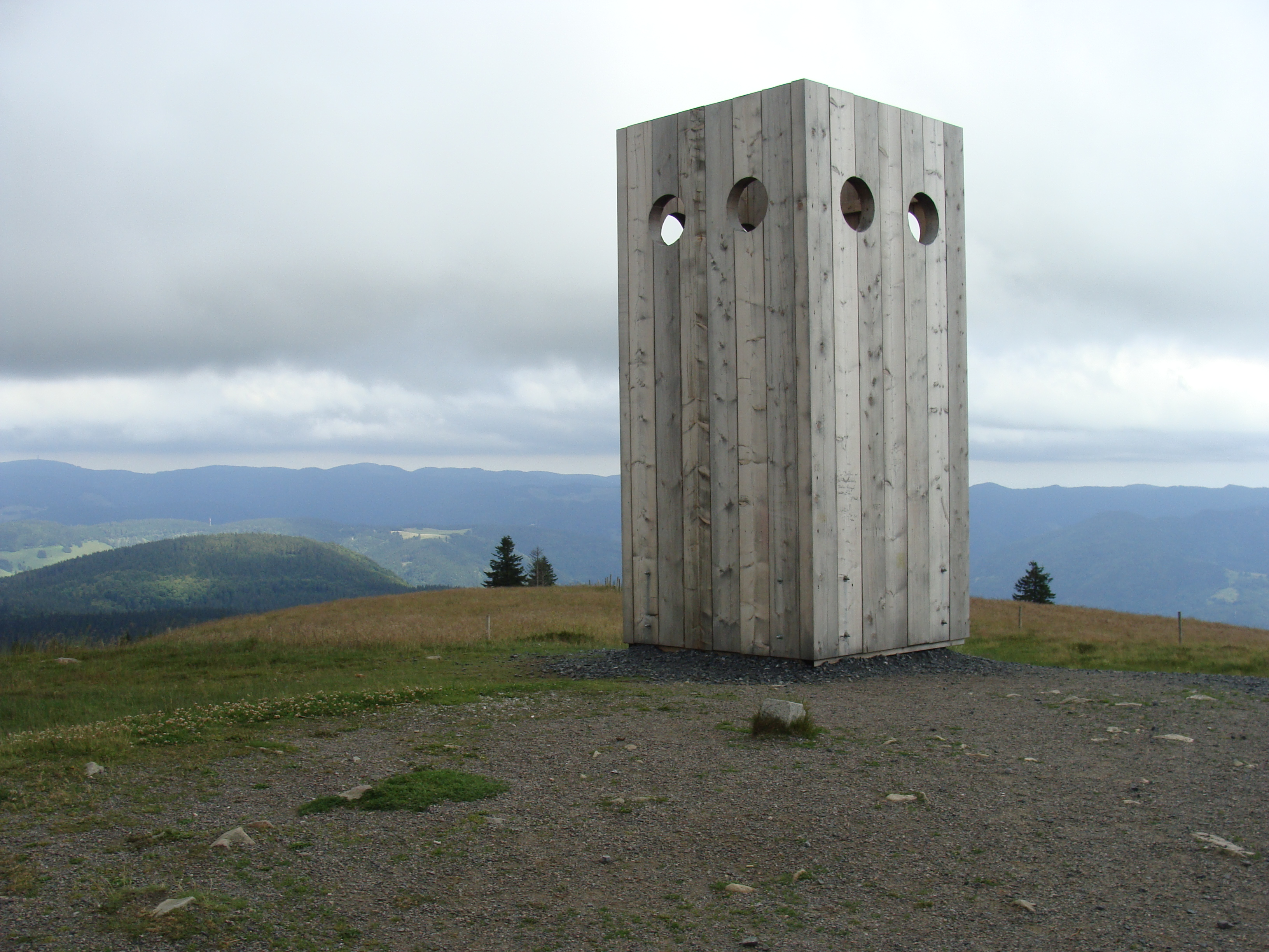 Marco Schuler, Orbi, Verhüllung des Gipfelkreuzes des Belchen im Südschwarzwald durch einen Kubus, bestehend aus 30 Bänken, die beim Papstbesuch im September 2011 in Freiburg eingesetzt worden waren